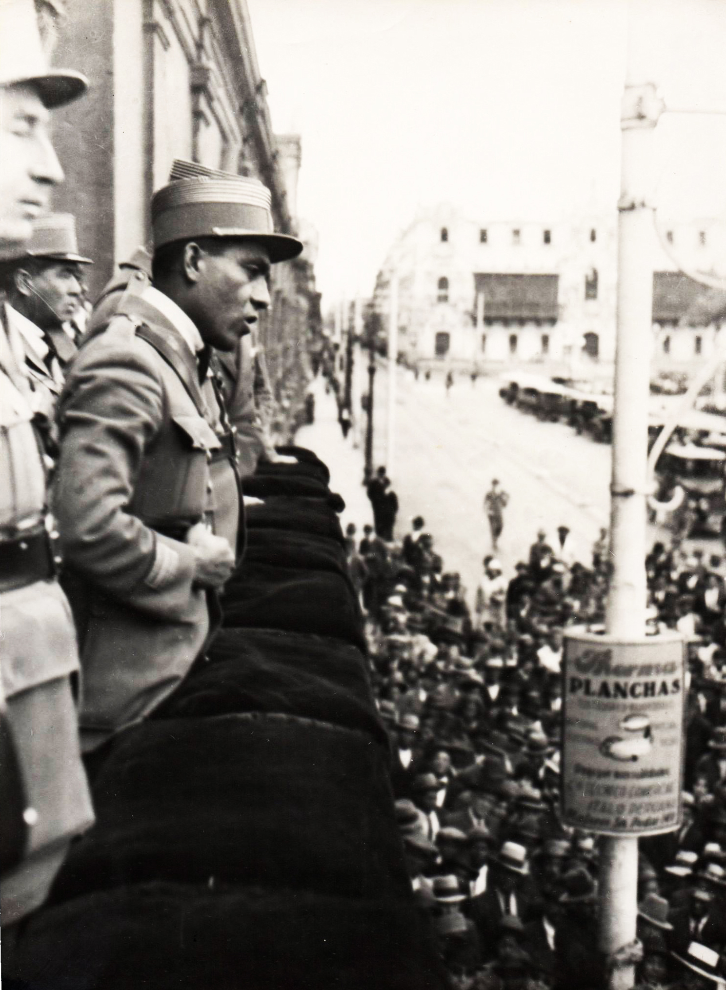 El Comandante Luis M. Sánchez Cerro, jefe de la revolución contra el presidente Leguía, dirigiéndose a la multitud en Lima, el 22 de agosto de 1930.